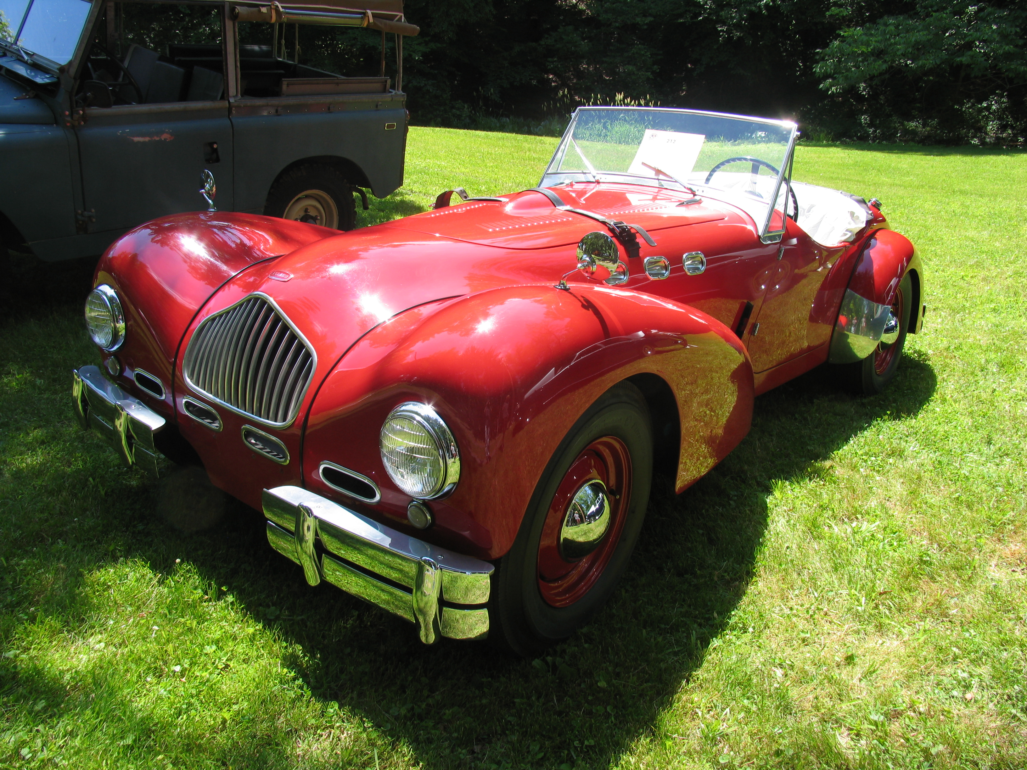 Allard K2